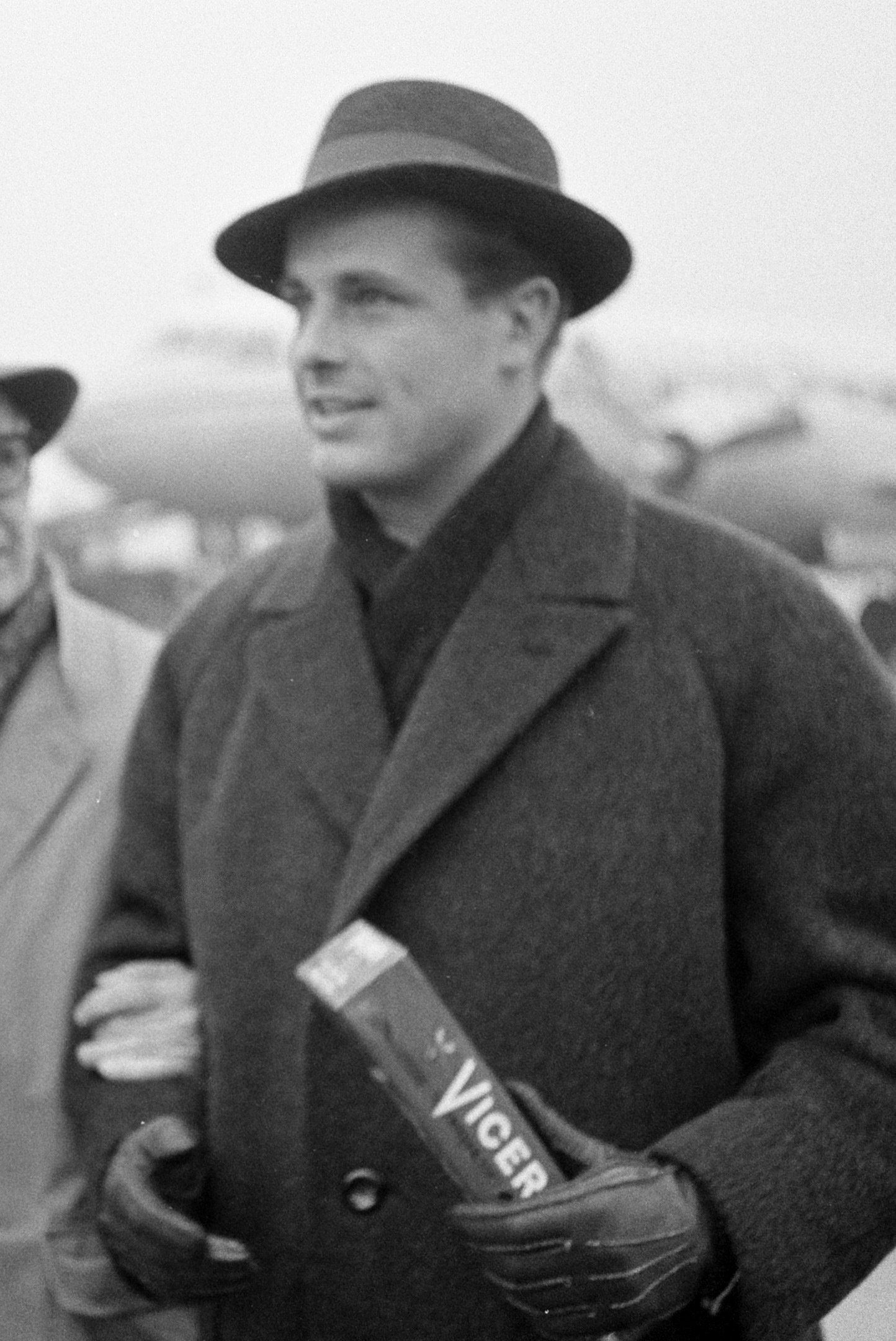 Aankomst Duitse filmacteur Joachim Hansen op Schiphol Joachim Hansen tijdens persconferentie